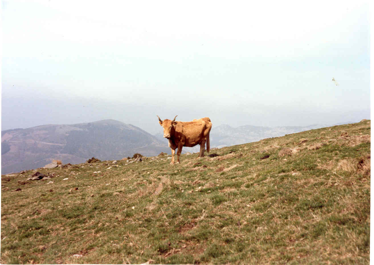 Betizu bat Gorbeia mendi-multzoan